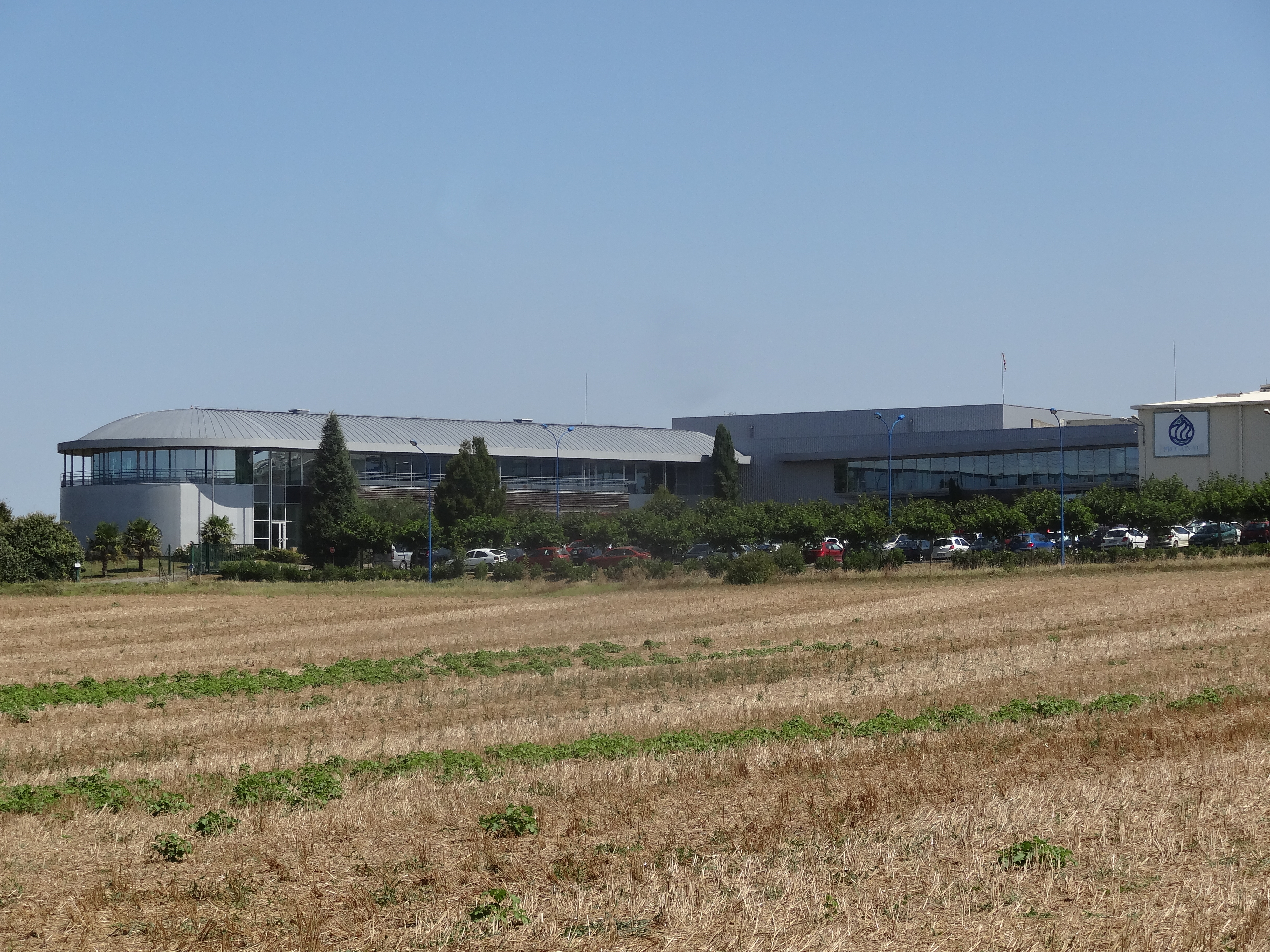 L'sine Prolainat à Blanquefort.